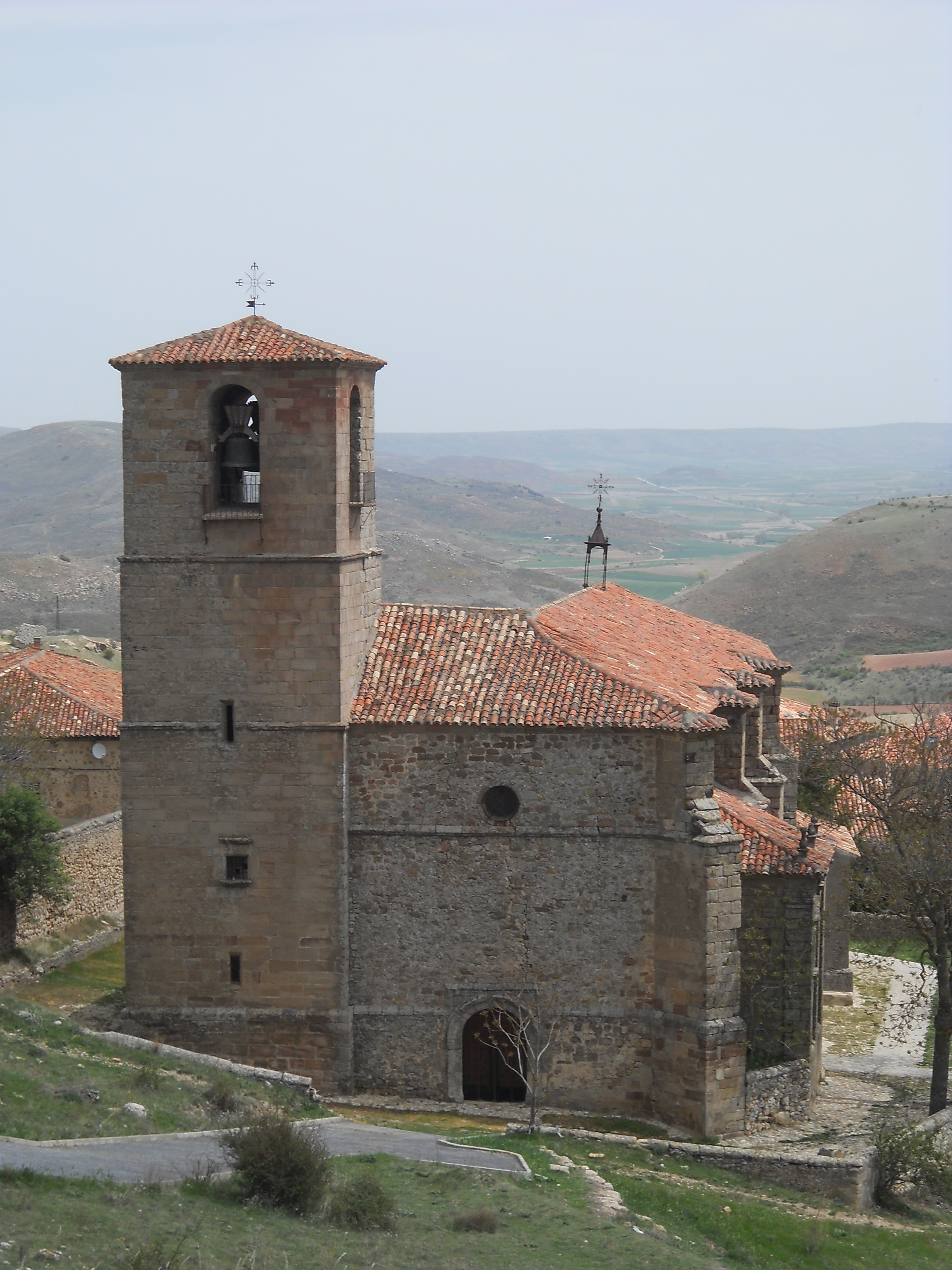 Iglesia de la Santísima Trinidad, Atienza, Guadalajara, España